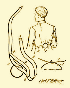 snore ball - Remède pour empécher de dormir sur le dos et donc de ronfler